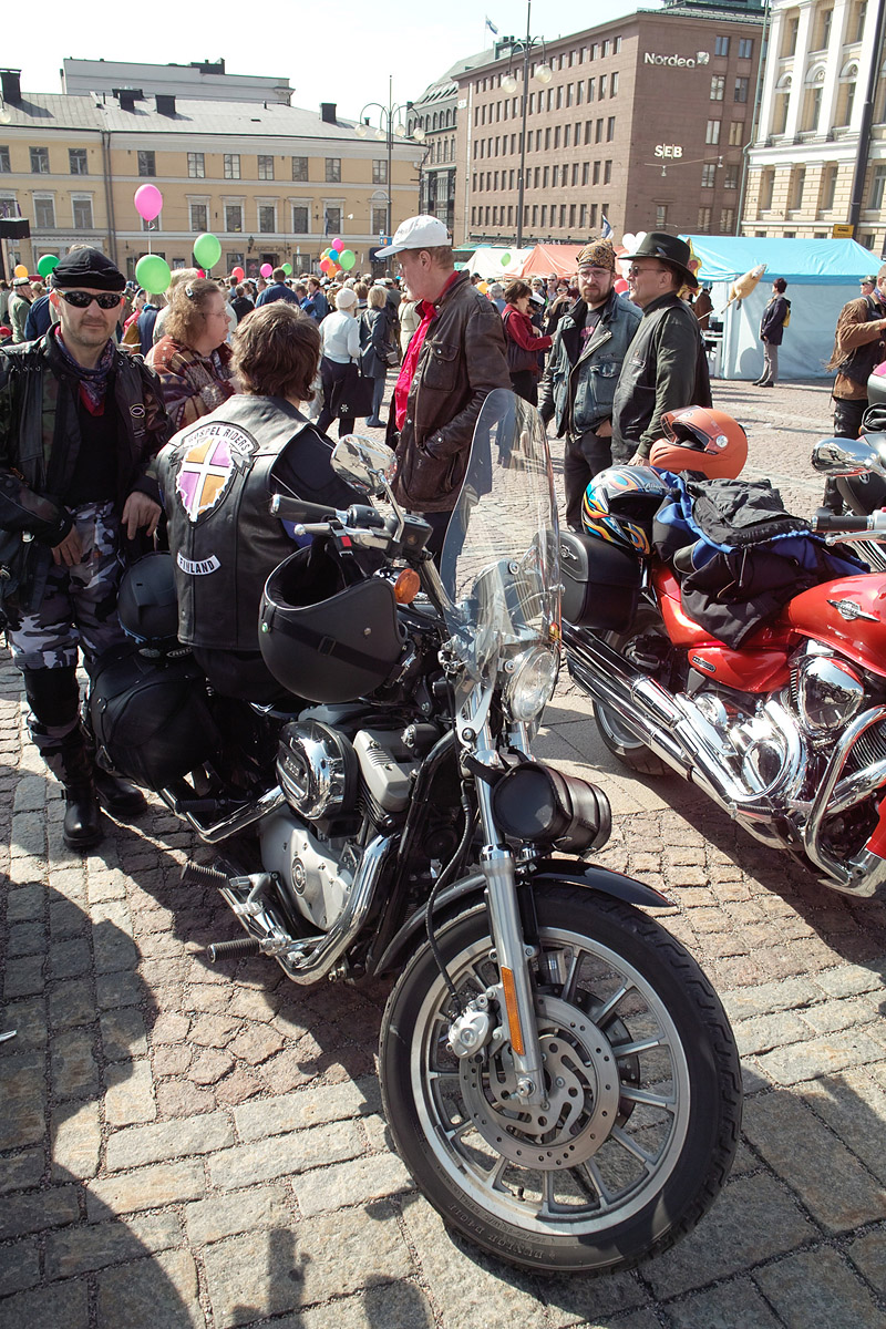 Gospel Riders Finland